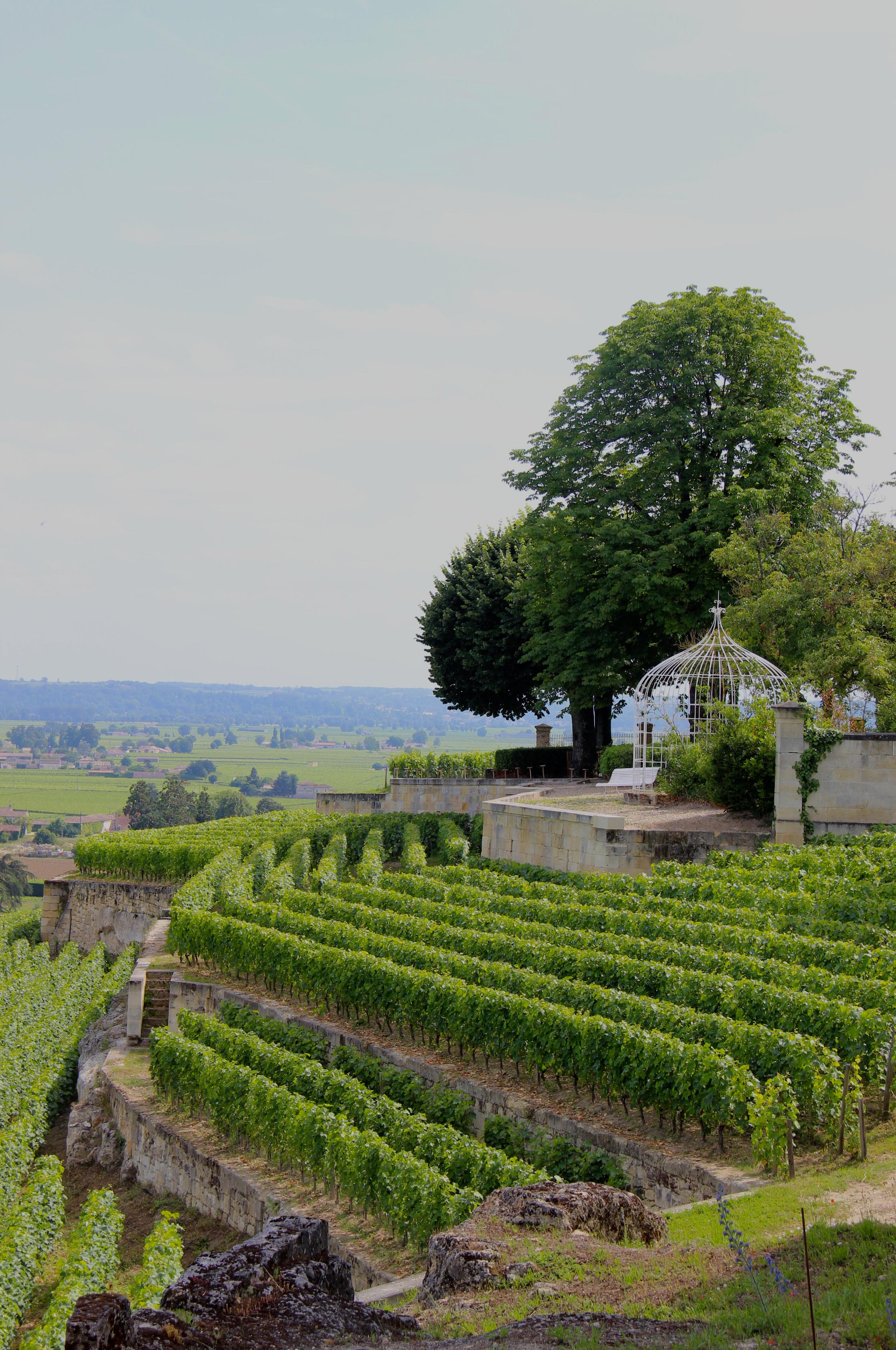 Domaine du Château Ausone, France